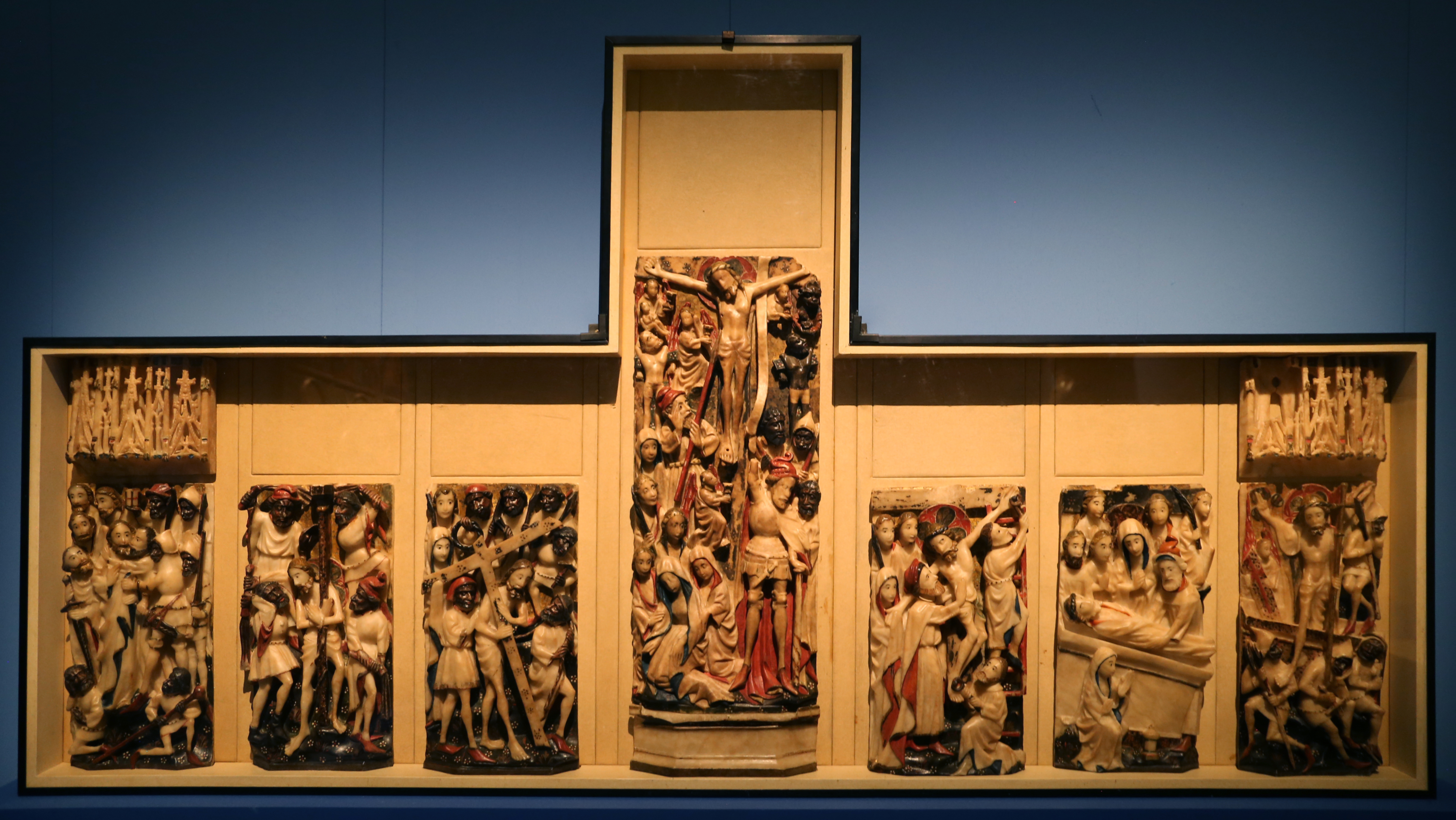 Palazzo Lanfranchi This is a photo of a monument which is part of cultural heritage of Italy.